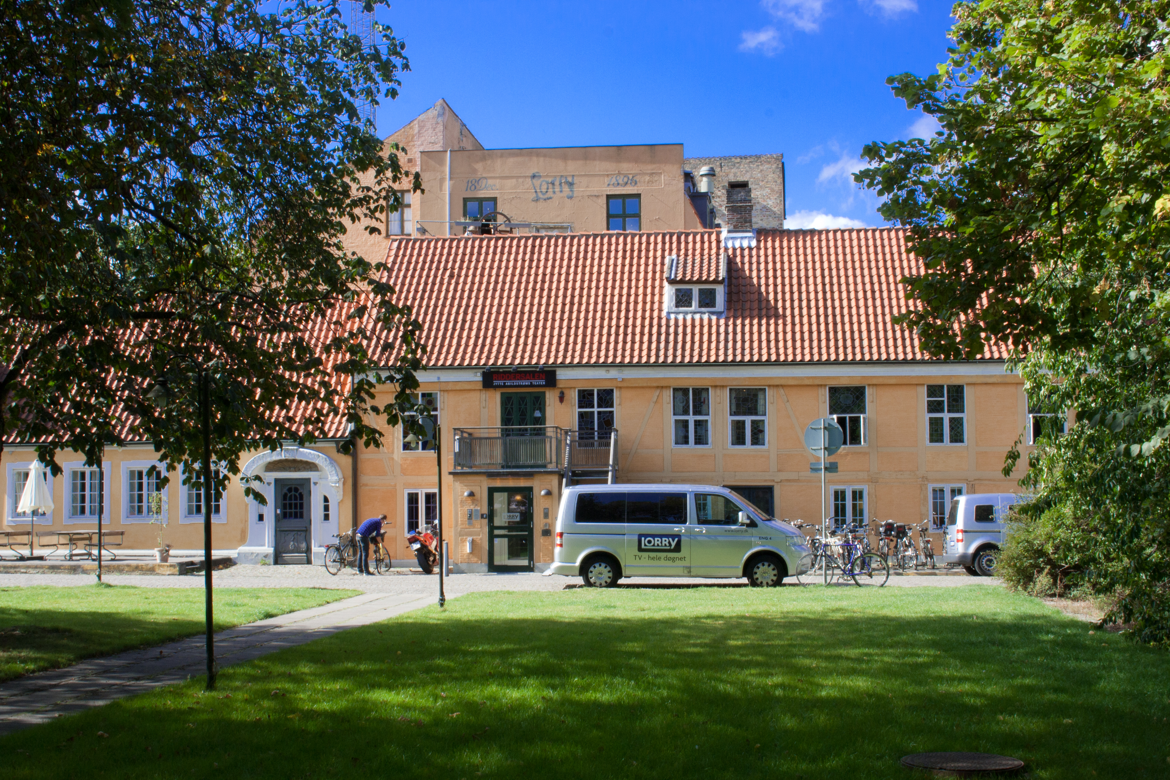 Lorry